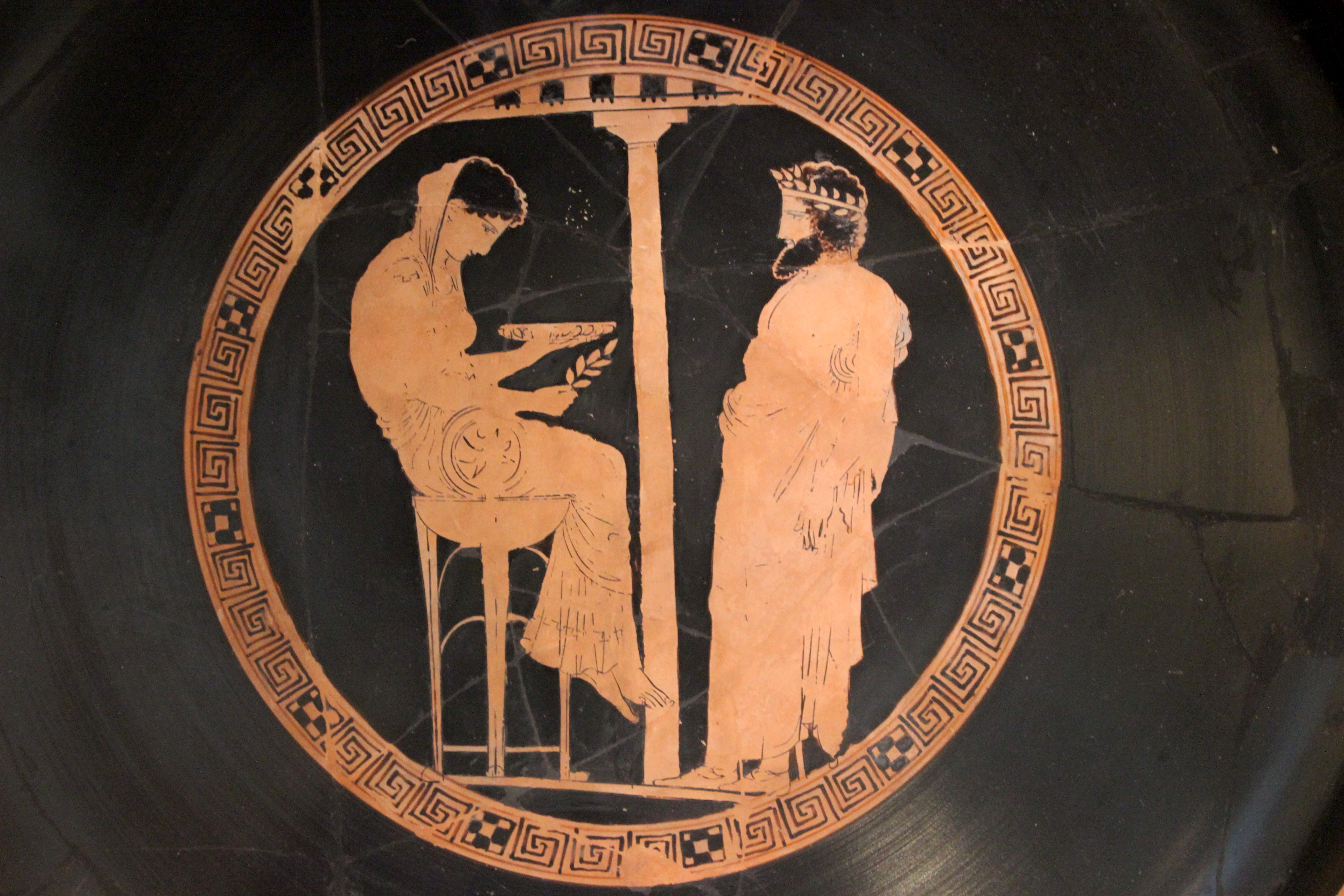 Berlín, Altes Museum. Kylix con Temis y Egeo.